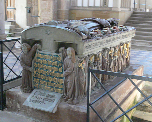 Heilsbronn, Münster St. Marien und Jakobus Grabmal der Kurfürstin Anna († 1512)